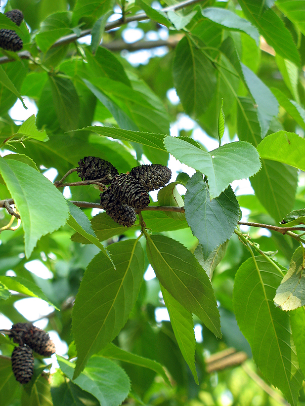 Dit betreft een foto van het blad en de vrucht van een Alnus x spaethii